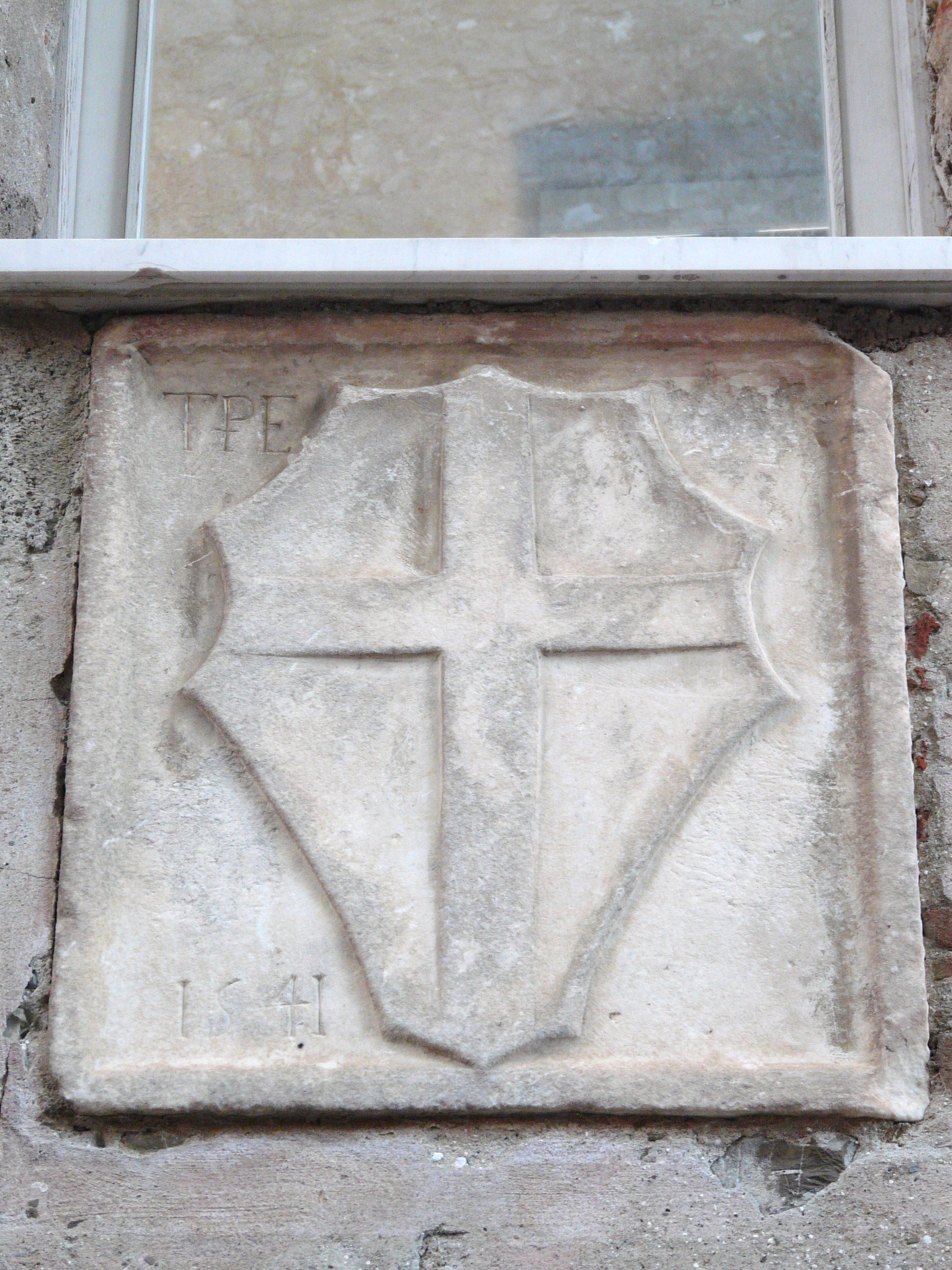 Bassorilievo con lo stemma della Repubblica di Genova, Ponzano Superiore, Santo Stefano di Magra, Liguria, Italia